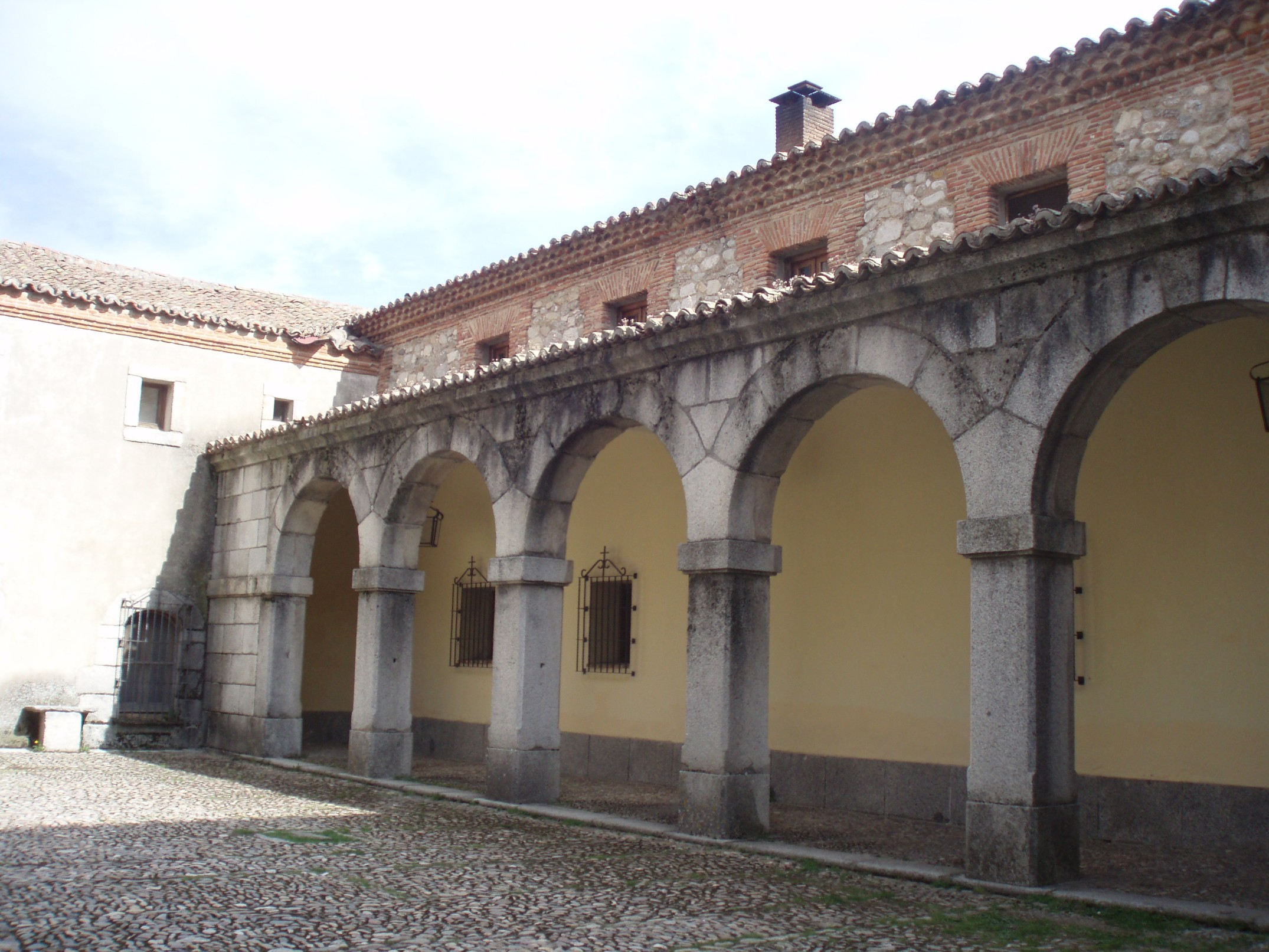 Claustro que da a la entrada de la iglesia del Monasterio de El Paular (Sierra de Guadarrama, España).